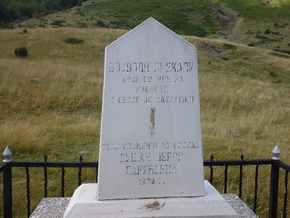 Дрекалов гроб на планини Рикавац (Кучи)